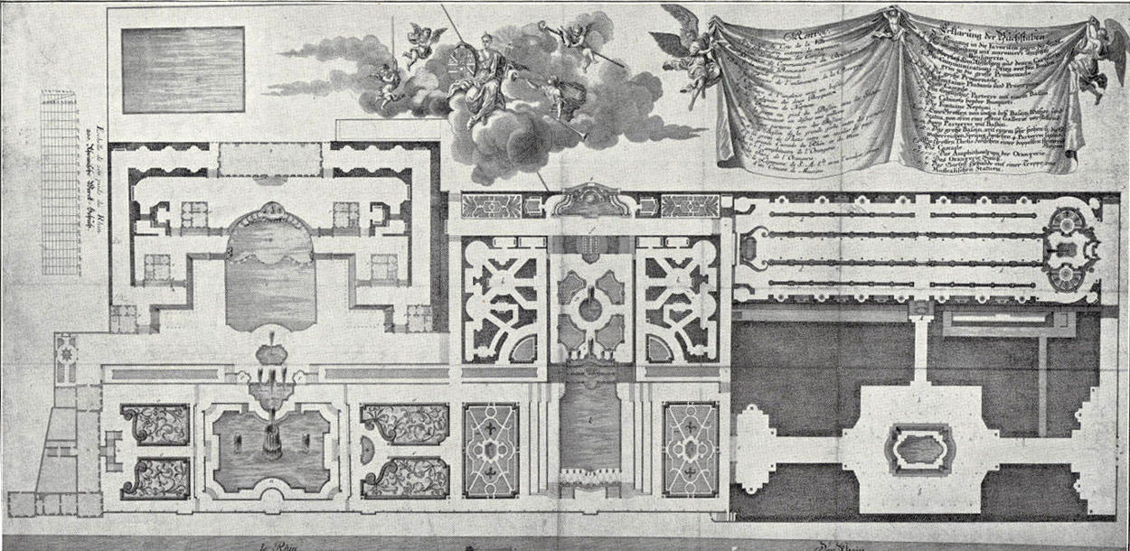 "Grundriß des Churfürstlichen Favoriten zu Mayntz" - Plan der Favorite nach einem Stich von Salomon Kleiner, 1726